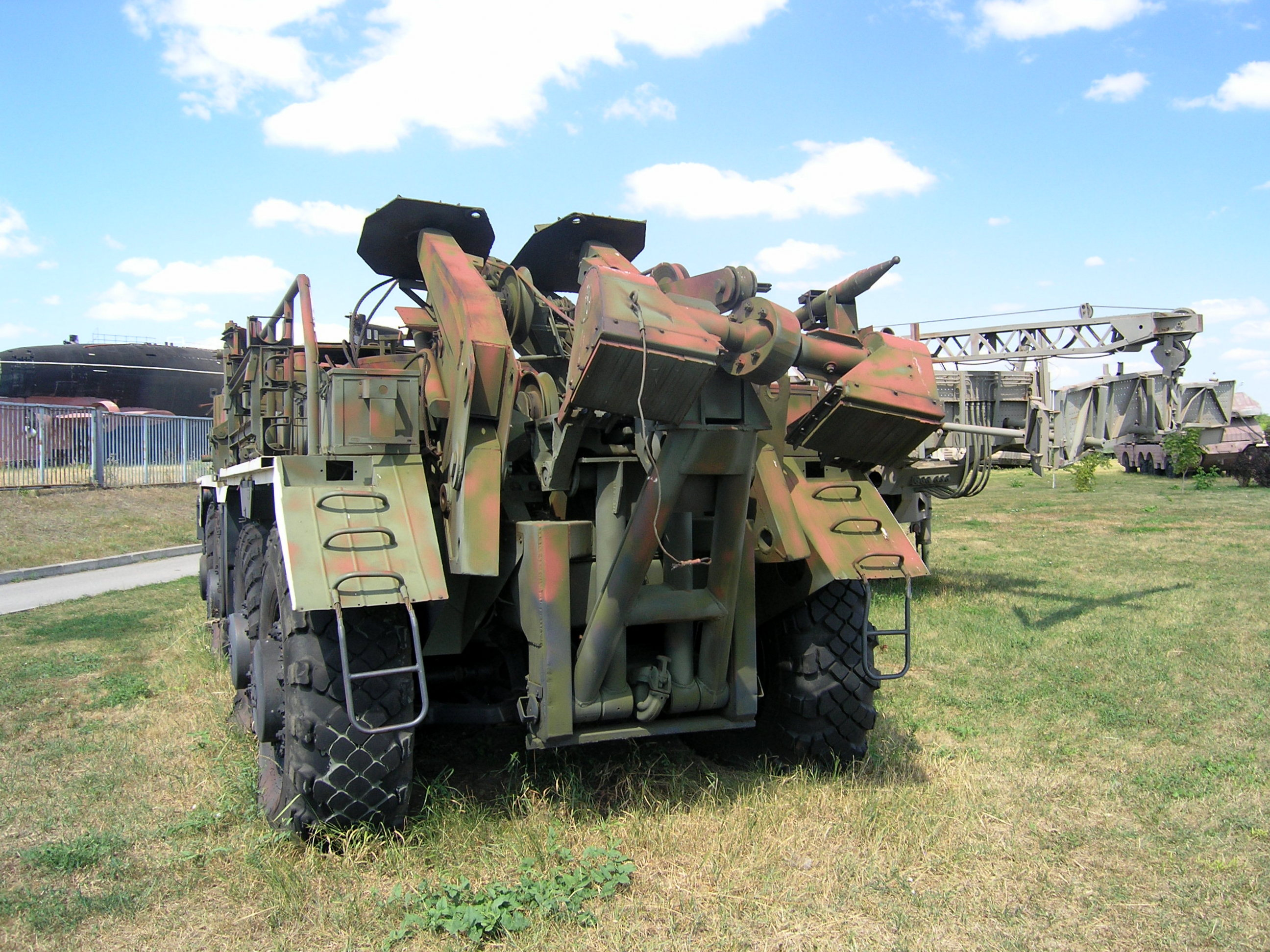 Колесный эвакуационный тягач КЭТ-Т